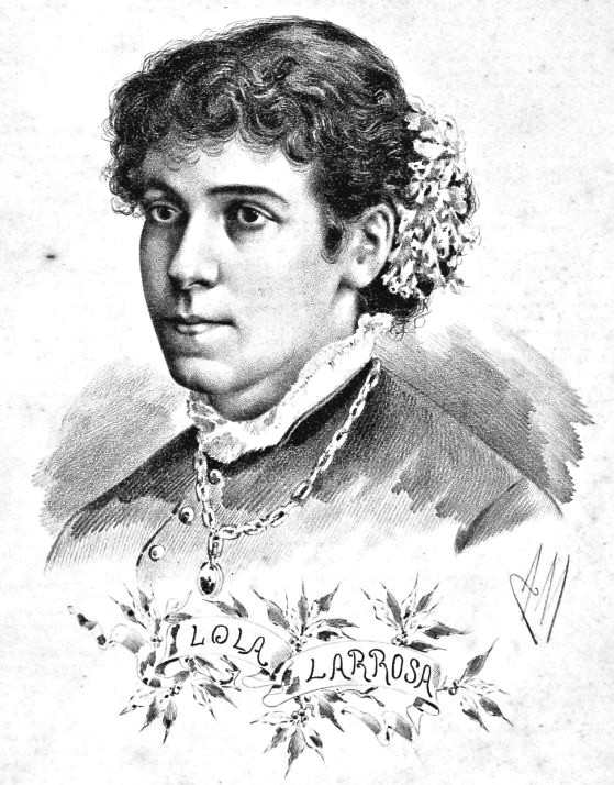 Lola Larrosa grabado aparecido en el número 18 de El Indiscreto el 28 de setiembre de 1884